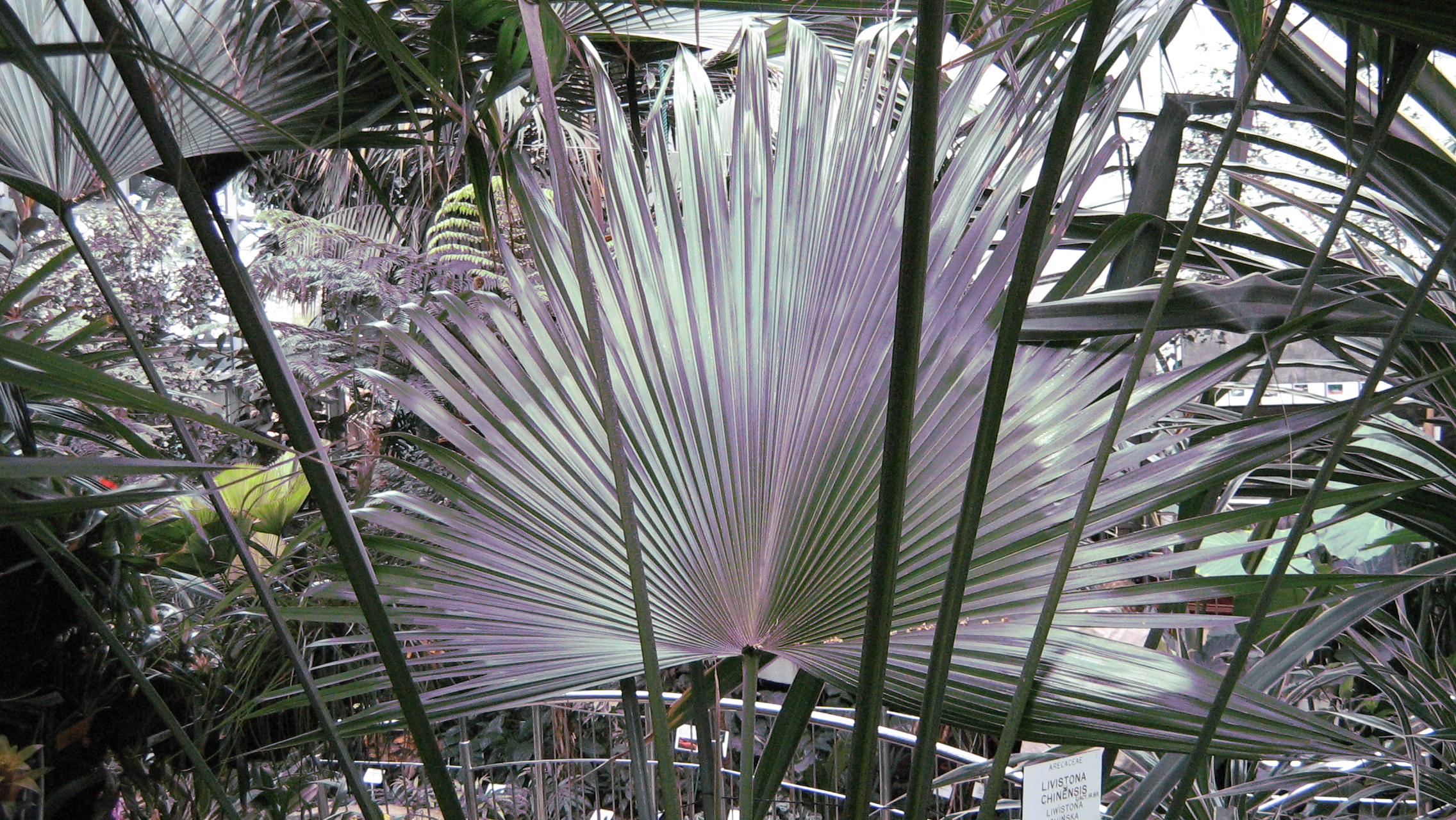 Liwistona Chińska w Palmiarni Łódzkiej